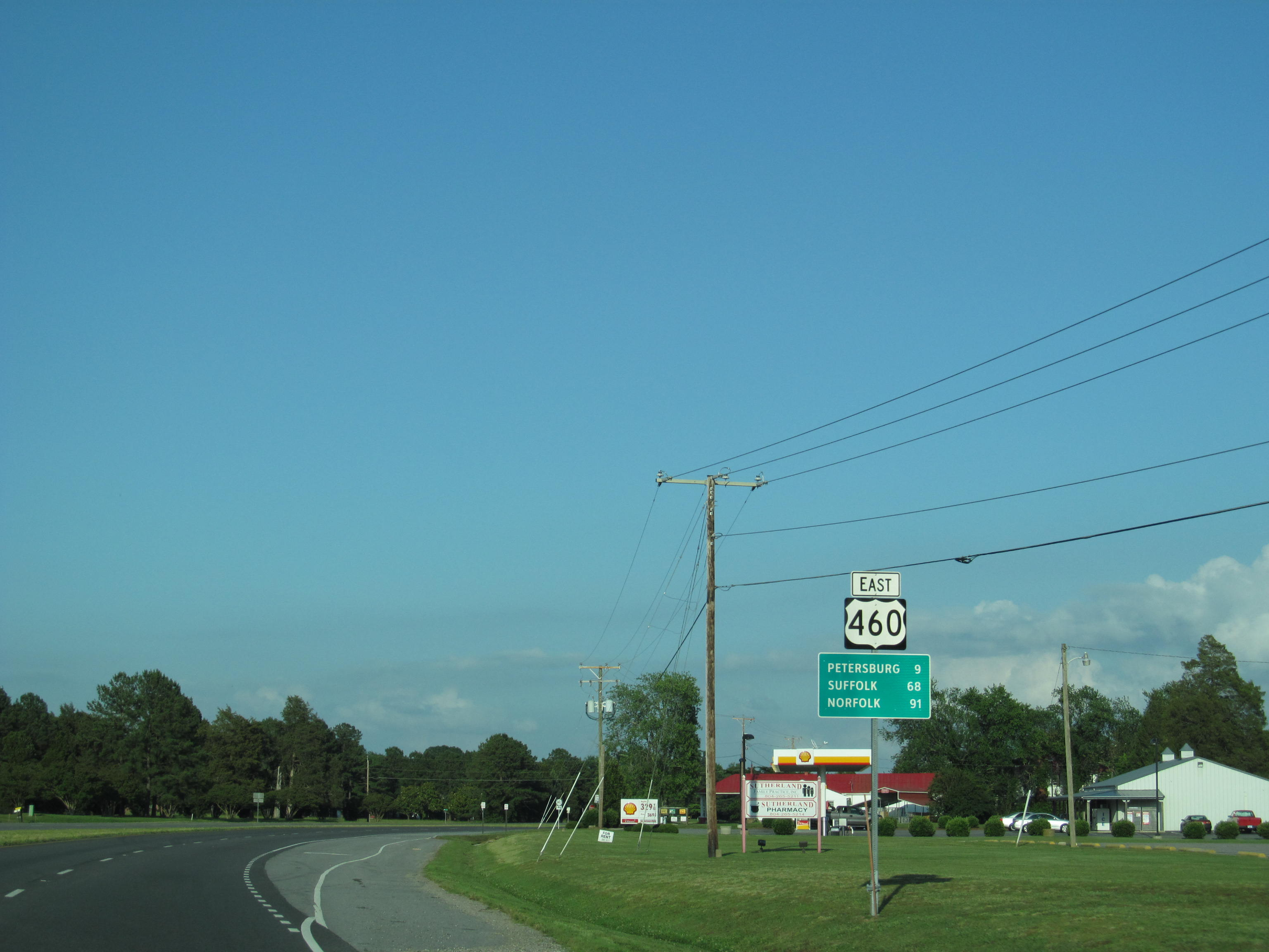 US Route 460 - Virginia